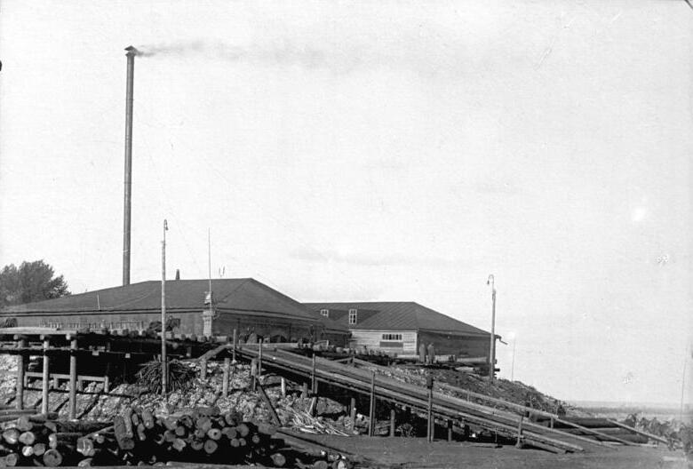 Russland, Pokrowsk, Sägemühlen Pokrowsk, Sägemühlen [Sowjetunion, Pokrowsk.- Sägemühlen]